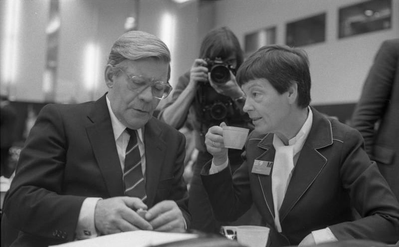 Außerordentlicher Parteitag der SPD im Messe-Kongreß-Zentrum in Köln zur Vorbereitung für die Europa-Parlament-Wahl 1979